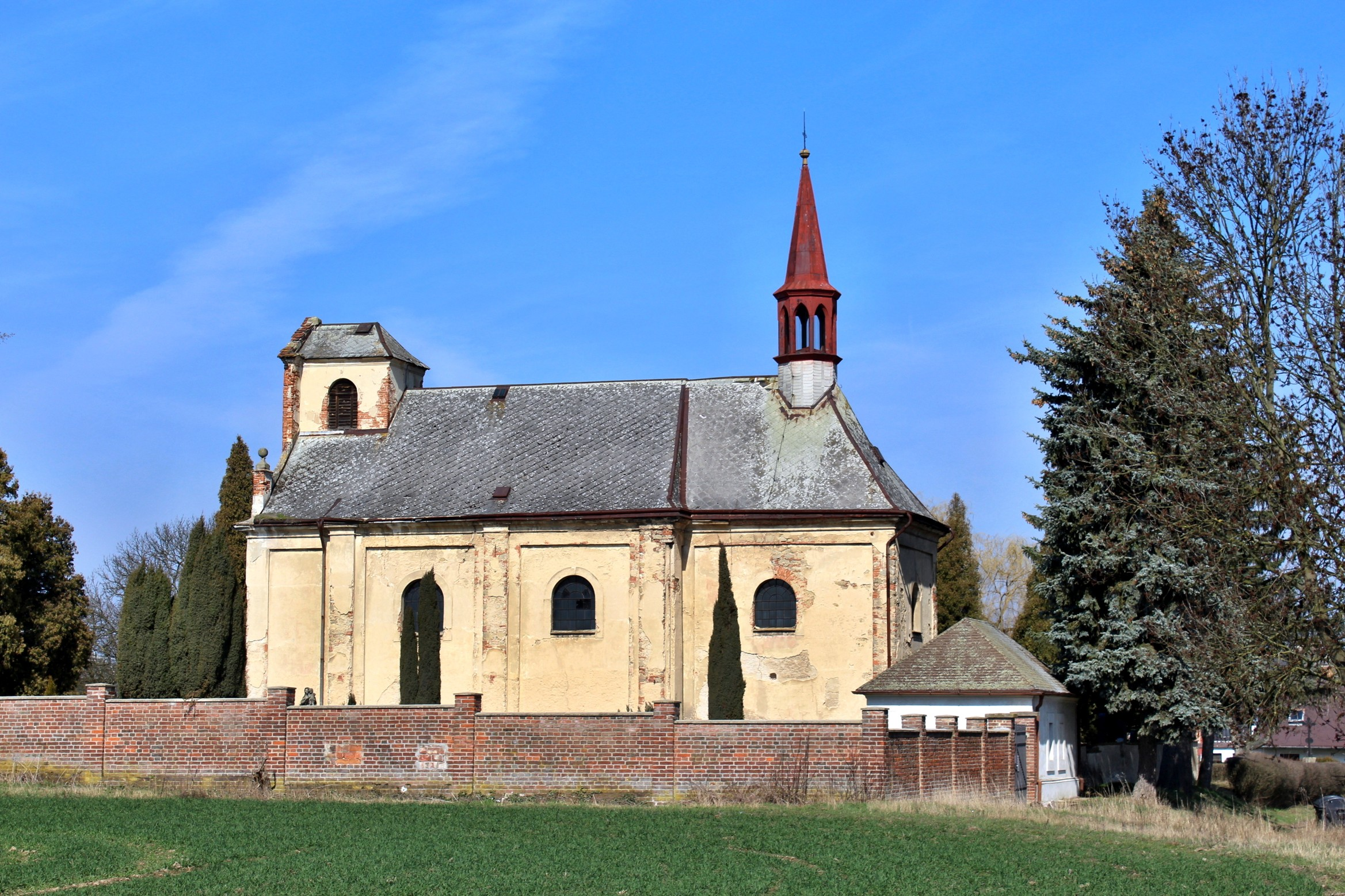 Čistá, kostel sv. Vavřince